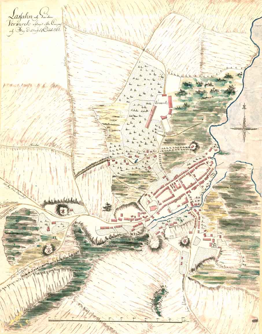 Handgezeichnete Karte der Stadt Lassan, 1761